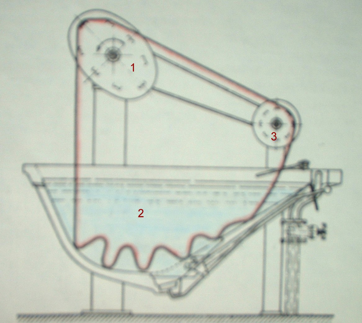 Schema: Haspelkufe